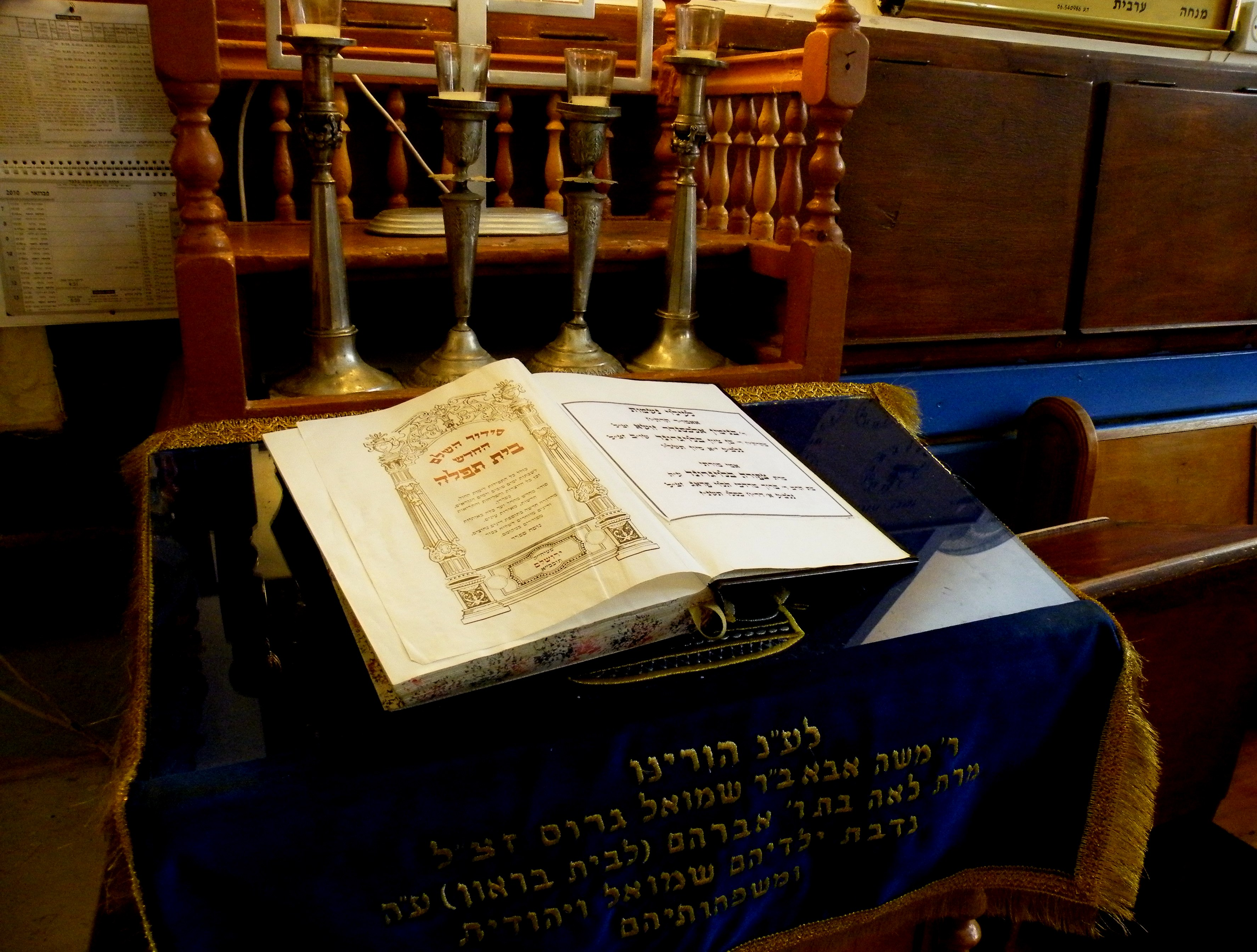 Ari Ashkenazi Synagogue, Safed.